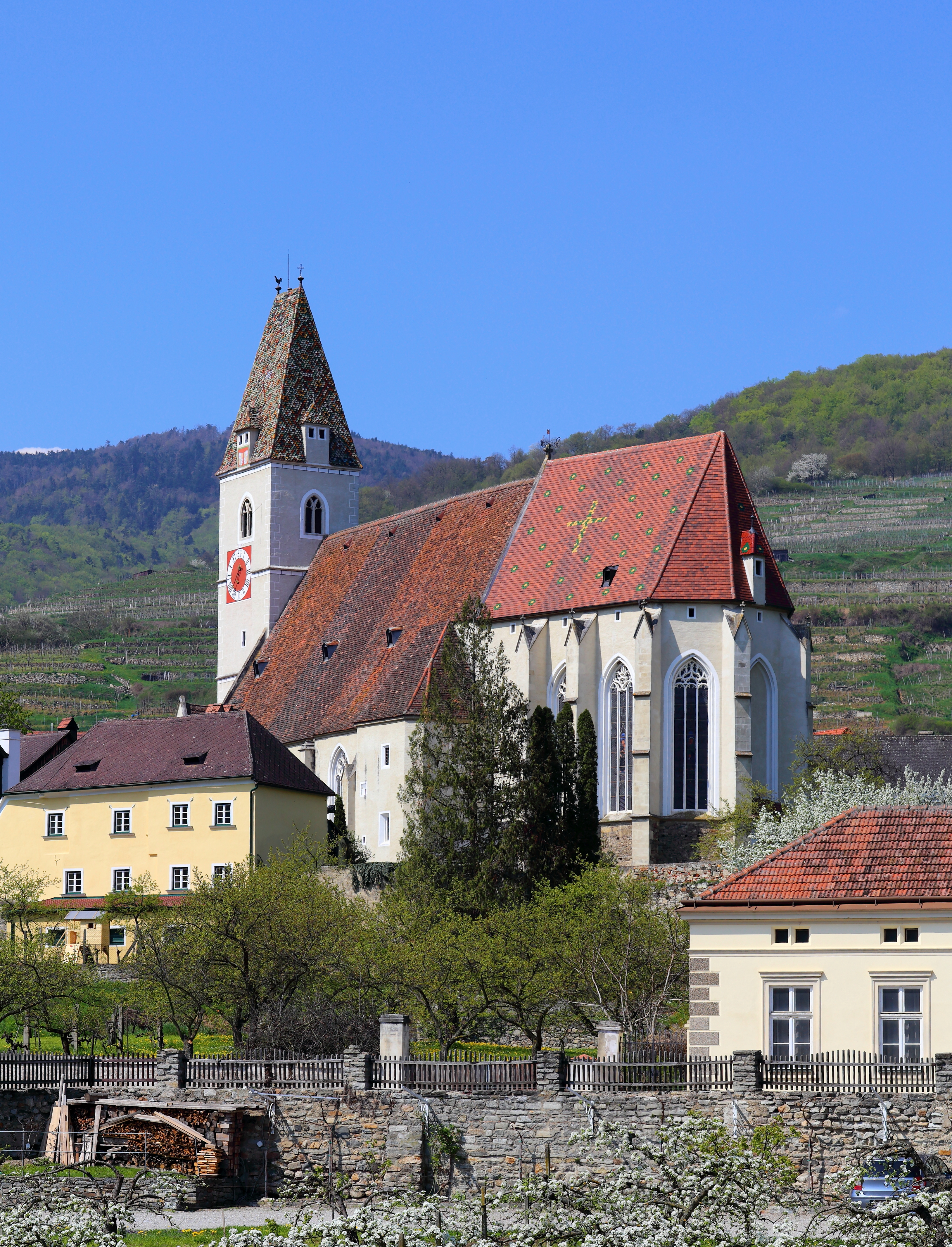 Südostansicht der röm.-kath. Pfarrkirche hl. Mauritius in der niederösterreichischen Marktgemeinde Spitz. Eine spätgotische Hallenkirche mit vorgestelltem Westturm und einem stark aus der Achse geknickten Langchor, die in erhöhter Lage errichtet wurde.